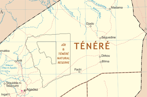 Map of Ténéré